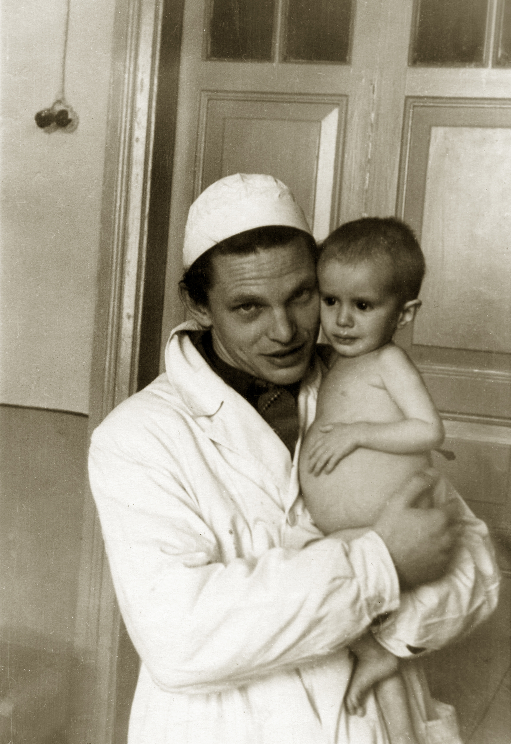 Врач Рэм Вячеславович Болдырев